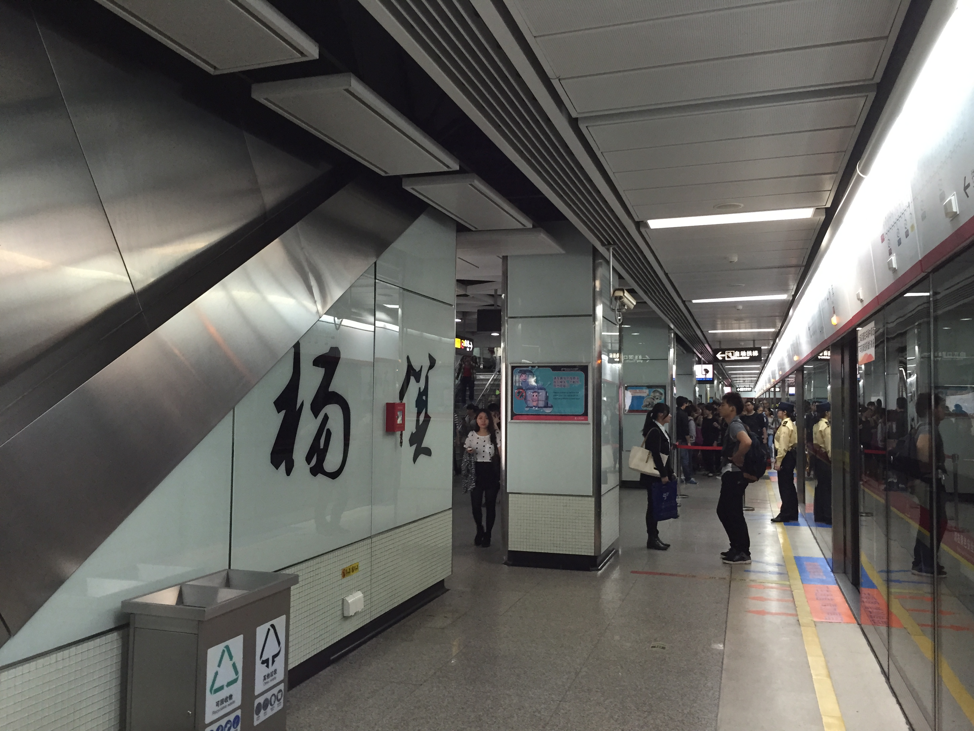 广州地铁杨箕站5号线月台（滘口方向）